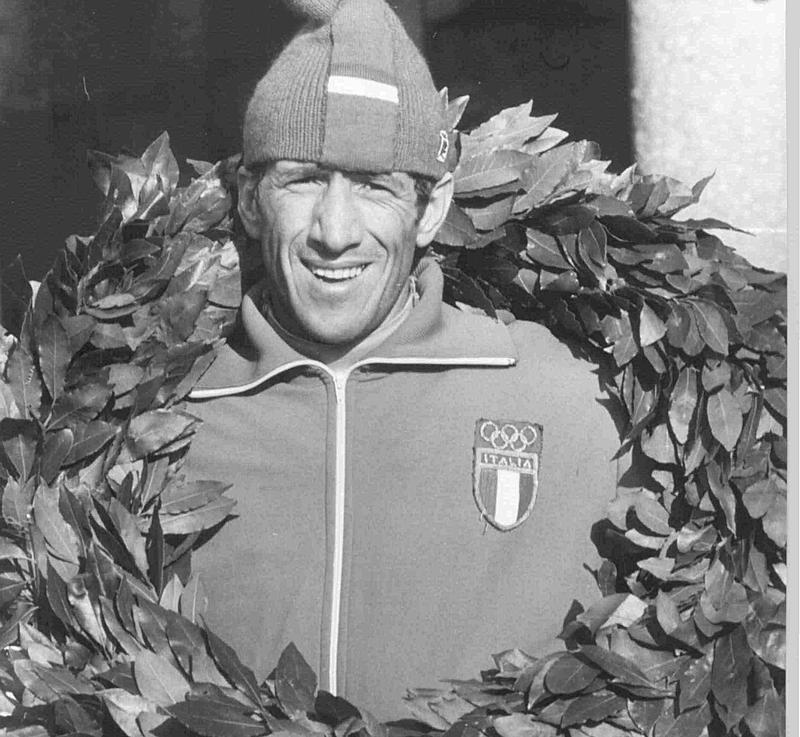 Tonino Biondini vincitore della Marcialonga 1976